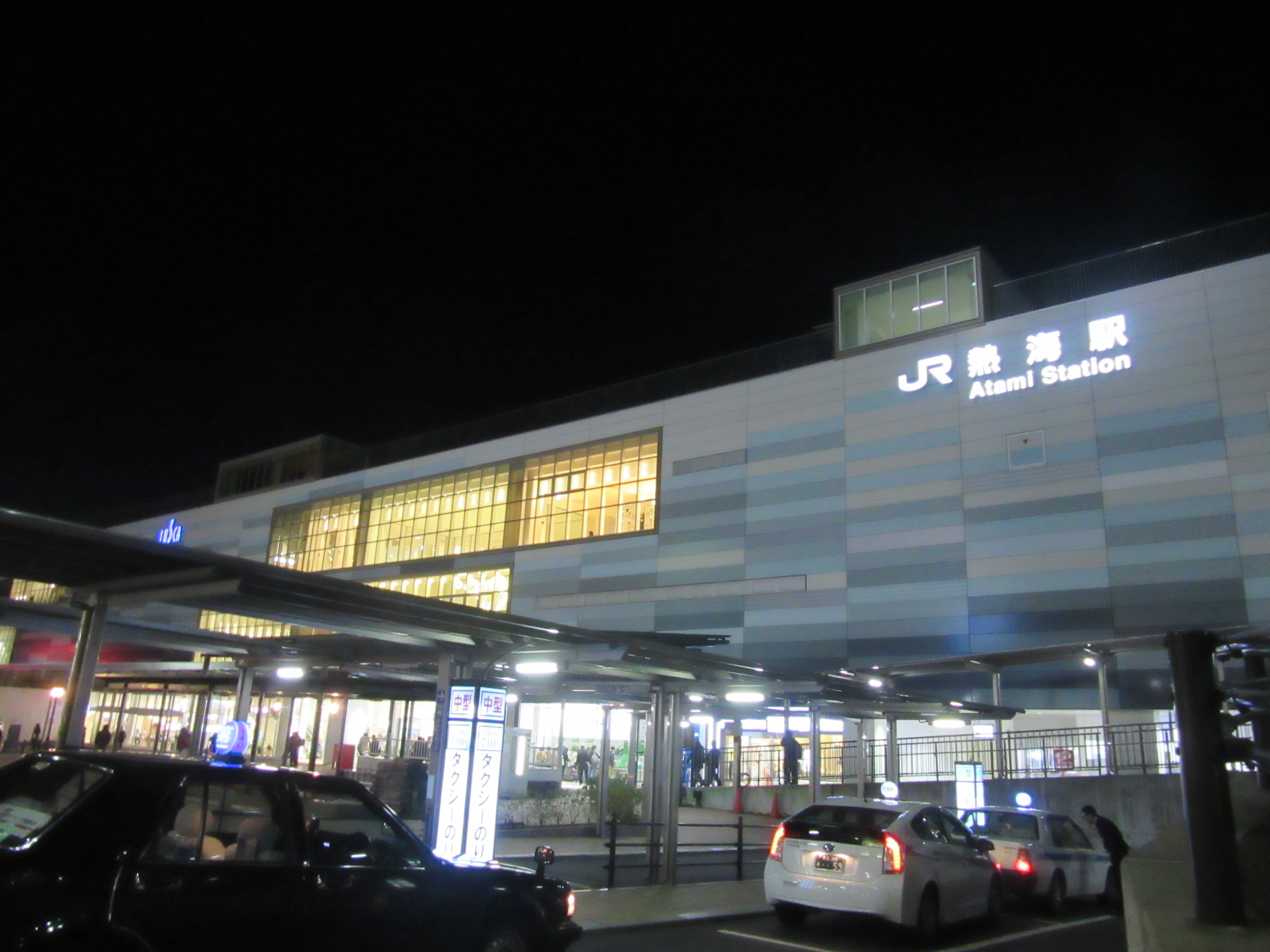 熱海駅新駅舎